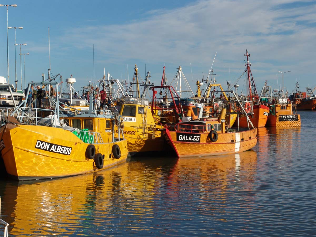 Valle inferior del rio Chubut